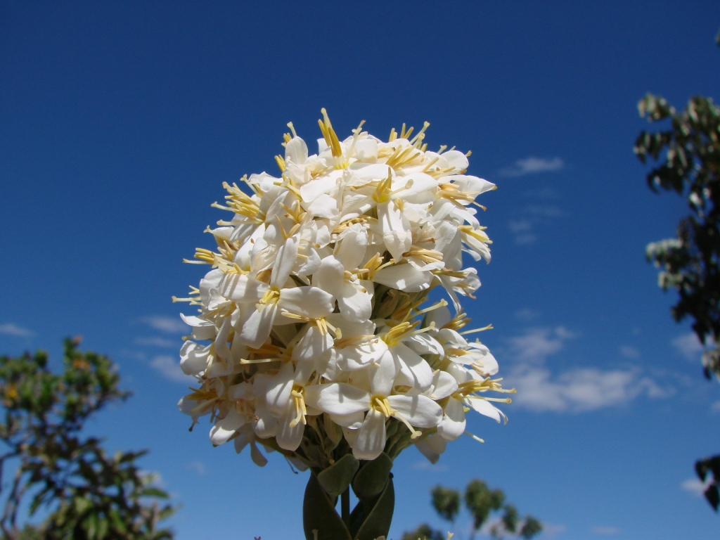 Deianira erubescens - GENTIANACEAE Pirenópolis - GO - Brasil